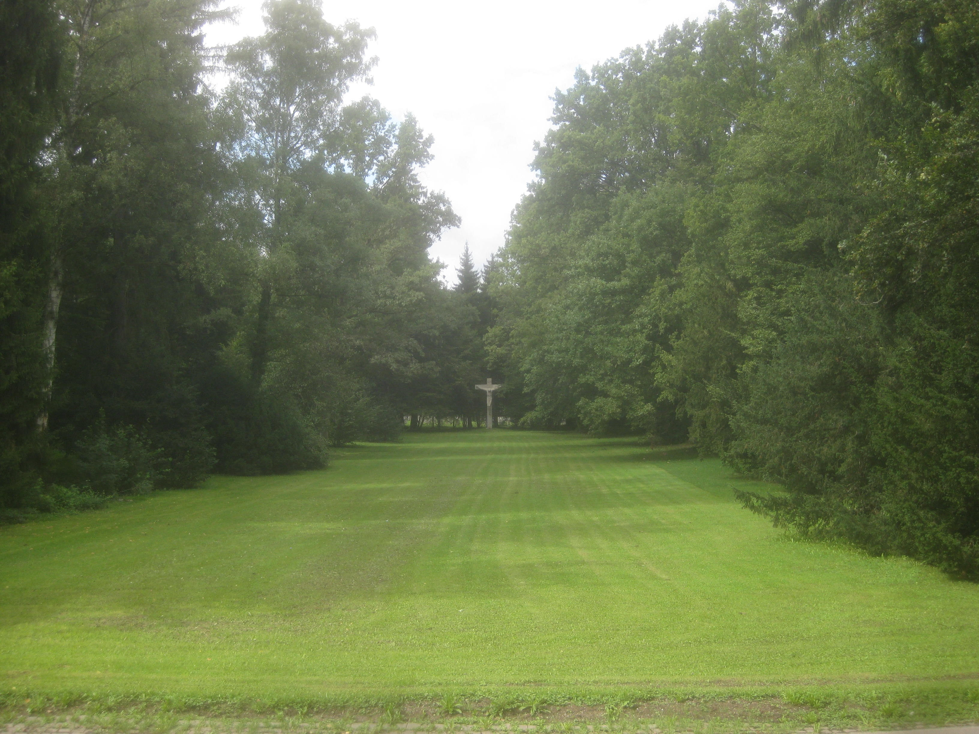 Waldfriedhof in Stuttgart, Große Wiese mit dem Kruzifix von Max Natter.